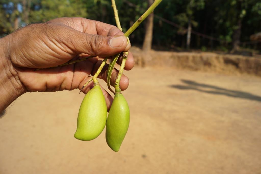 ಕನ್ನಡ: ಒಂದು ಜಾತಿಯ ಅಪ್ಪೆಮಿಡಿ